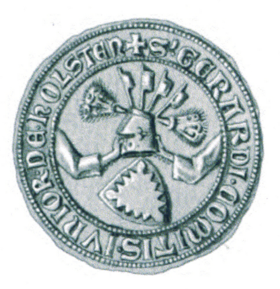 Siegel des Gerhard IV. (* um 1277; † 1323), Graf von Holstein-Plön. Das Siegel stammt aus der Zeit um 1312.